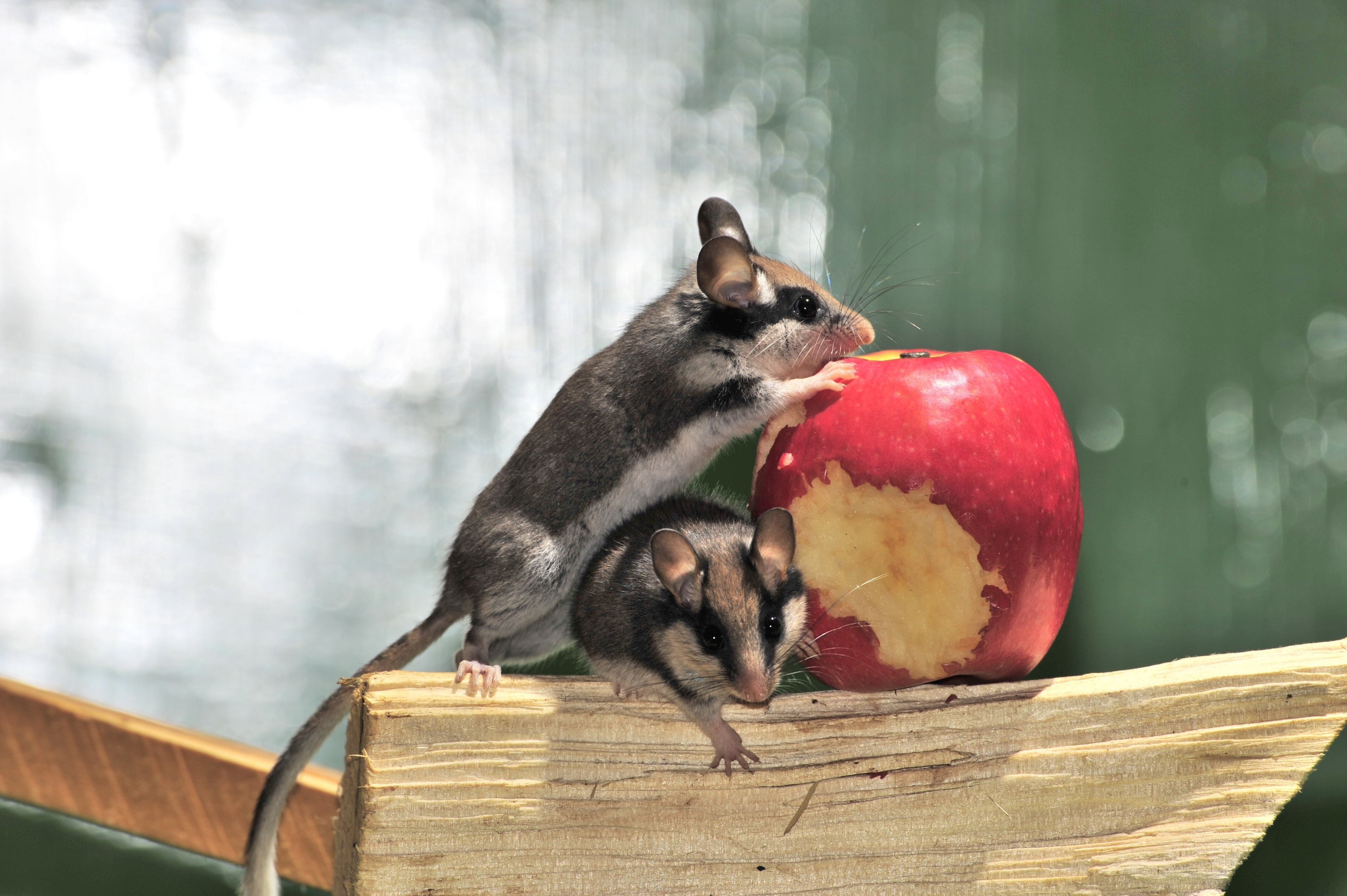 Gartenschläfer, zu zweit ist es viel besser.